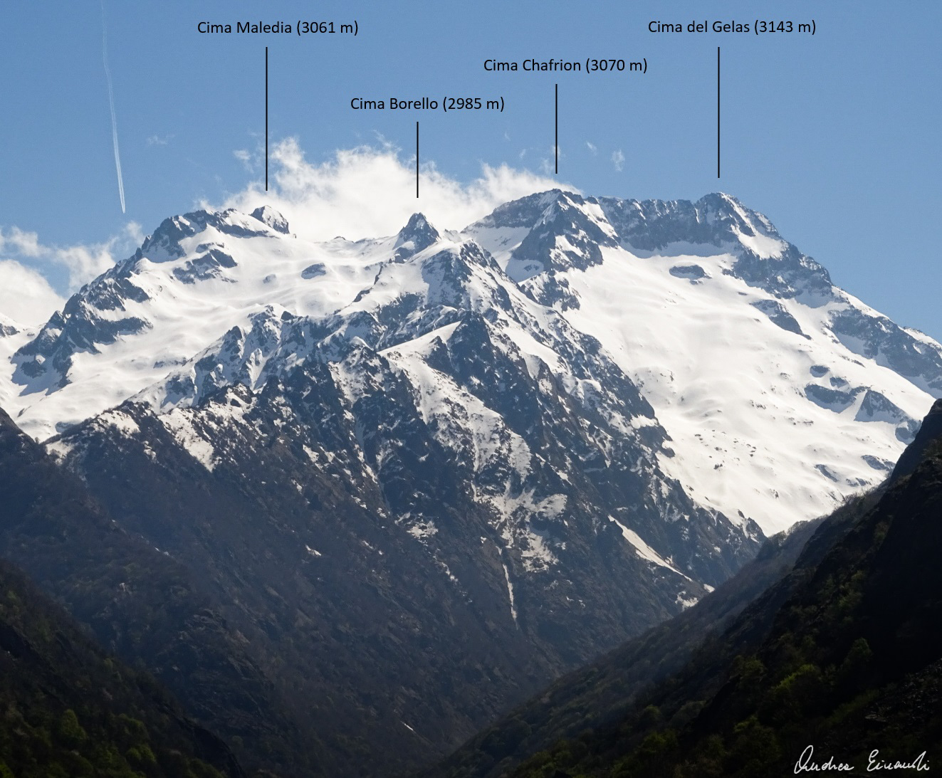 Monte Gelas e cime limitrofe viste dalla rotabile che sale al lago della Rovina (Entracque)